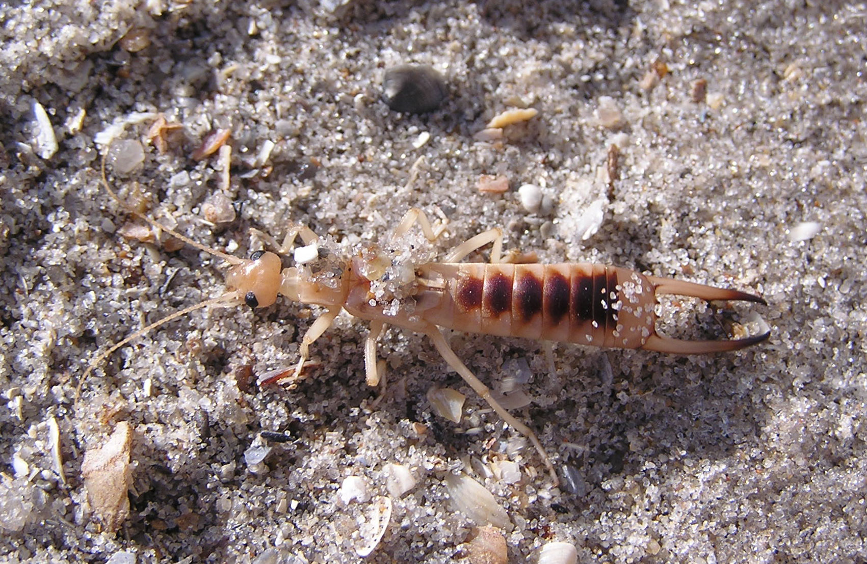 Уховертка Labidura riparia (Pallas, 1773), сфотографировано на Белосарайской косе в конце августа 2007